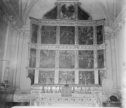 Retaule de la capella del Santíssim del Miracle. Joaquim Bordons i Wehrle (Entre 1901 i 1914)